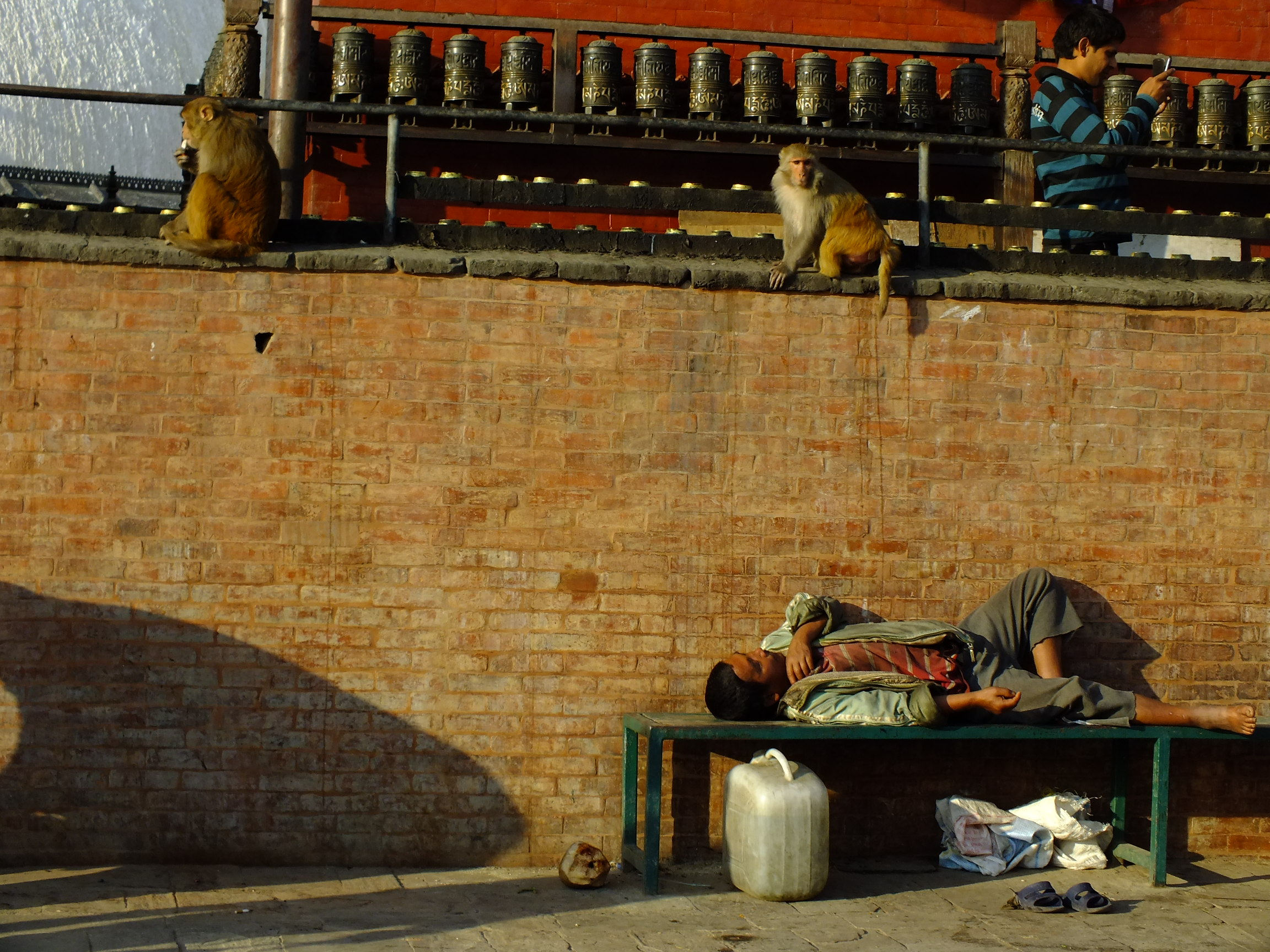 2015-03-08 Swayambhunath,Katmandu,Nepal,சுயம்புநாதர் கோயில்,スワヤンブナート